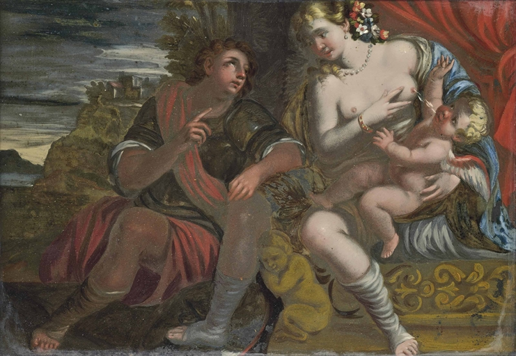 Venus, Cupido y Marte, óleo sobre cristal, 28 x 38 cm, subastado en Christie's, diciembre de 2013